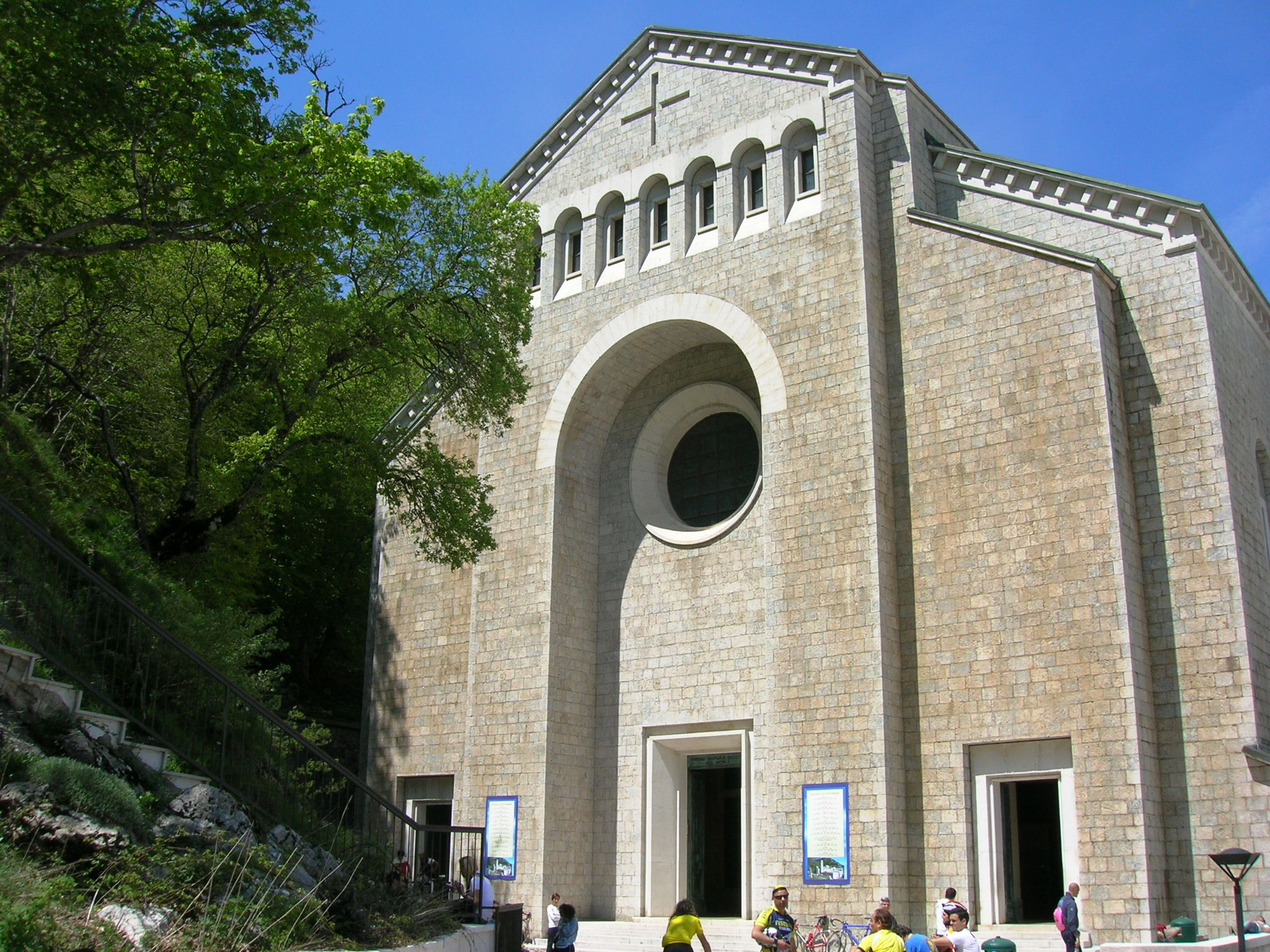 L'esterno della basilica cattedrale